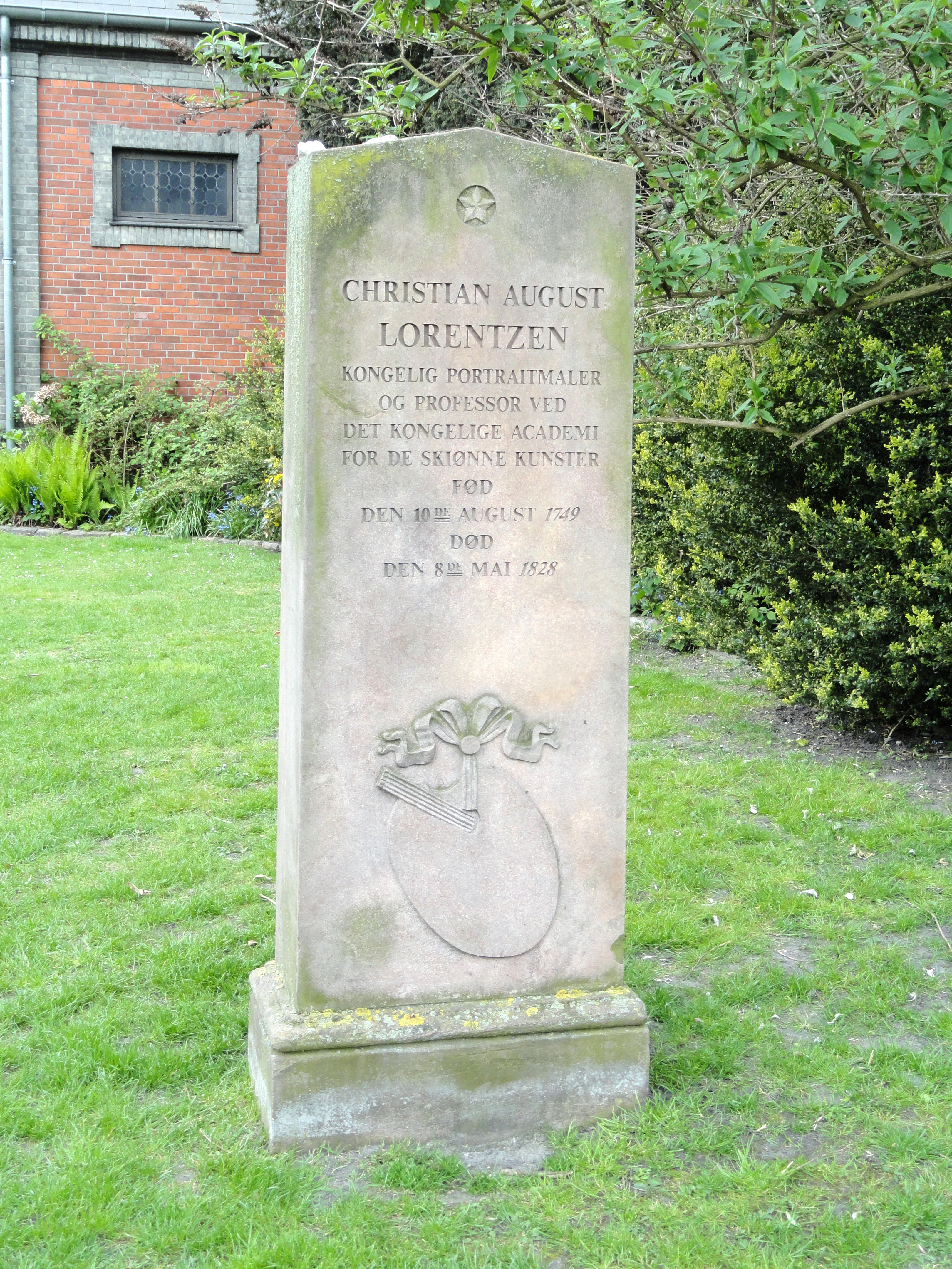 Memorial at Garnisons Kirke, Copenhagen, Denmark.